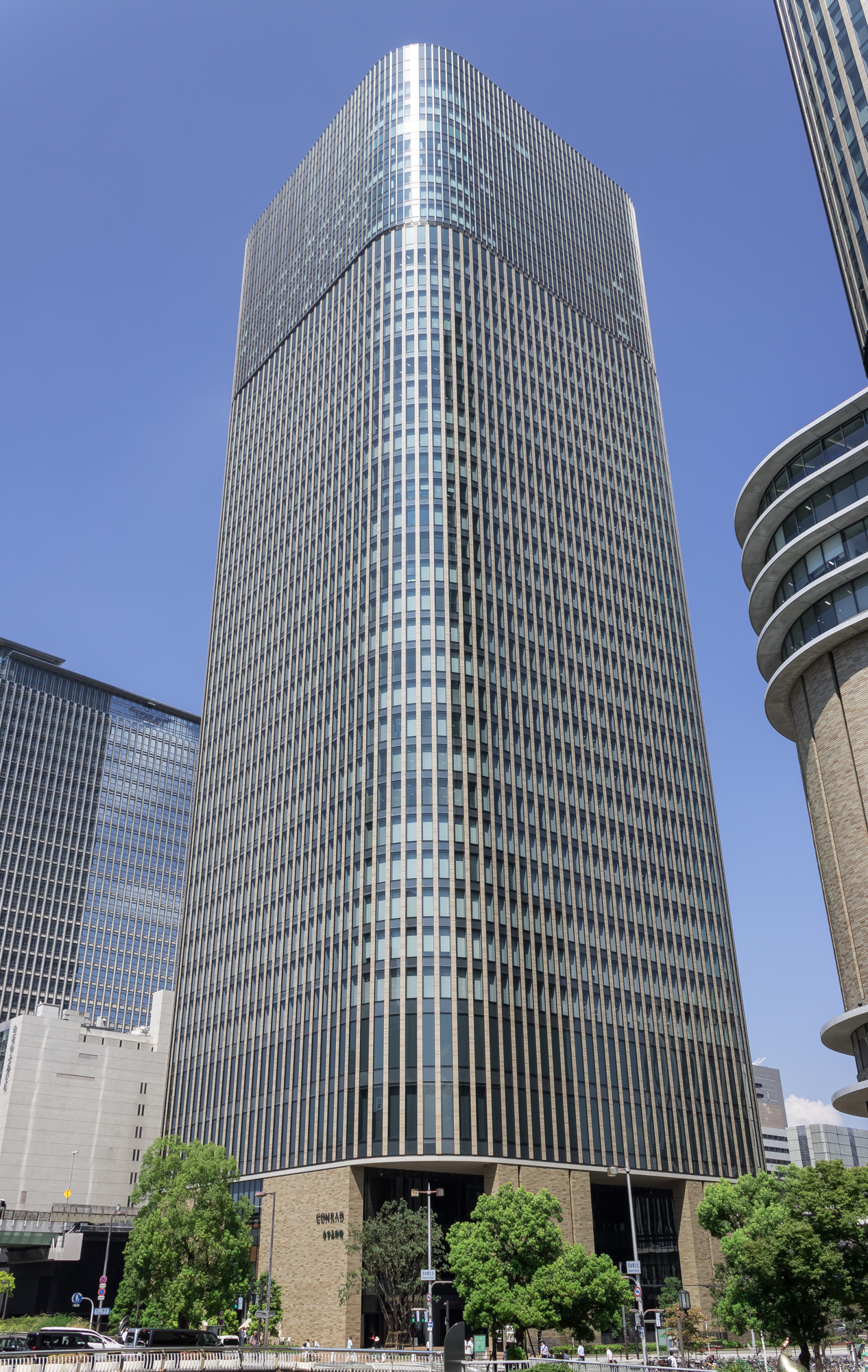 中之島フェスティバルタワーウェスト（大阪府）